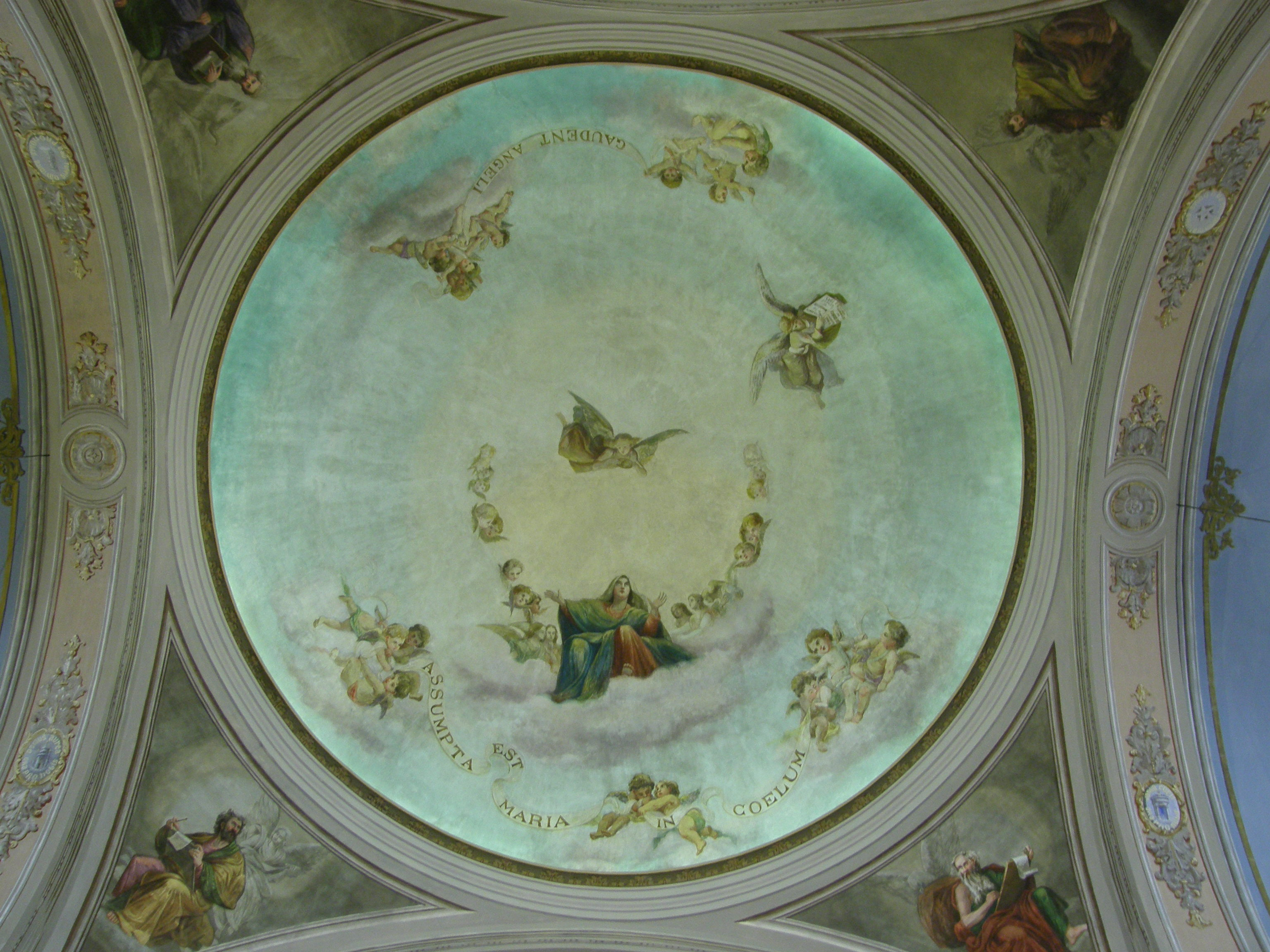 vue du plafond de l'église de Clermont-en-Genevois, après restaurations.